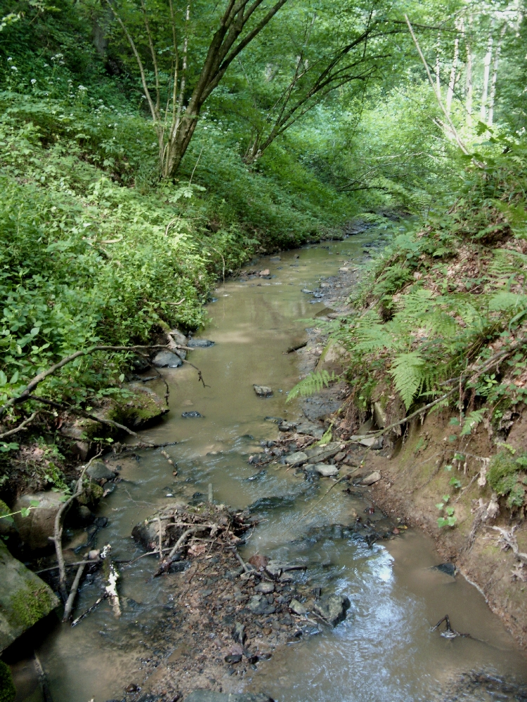 Limersbach